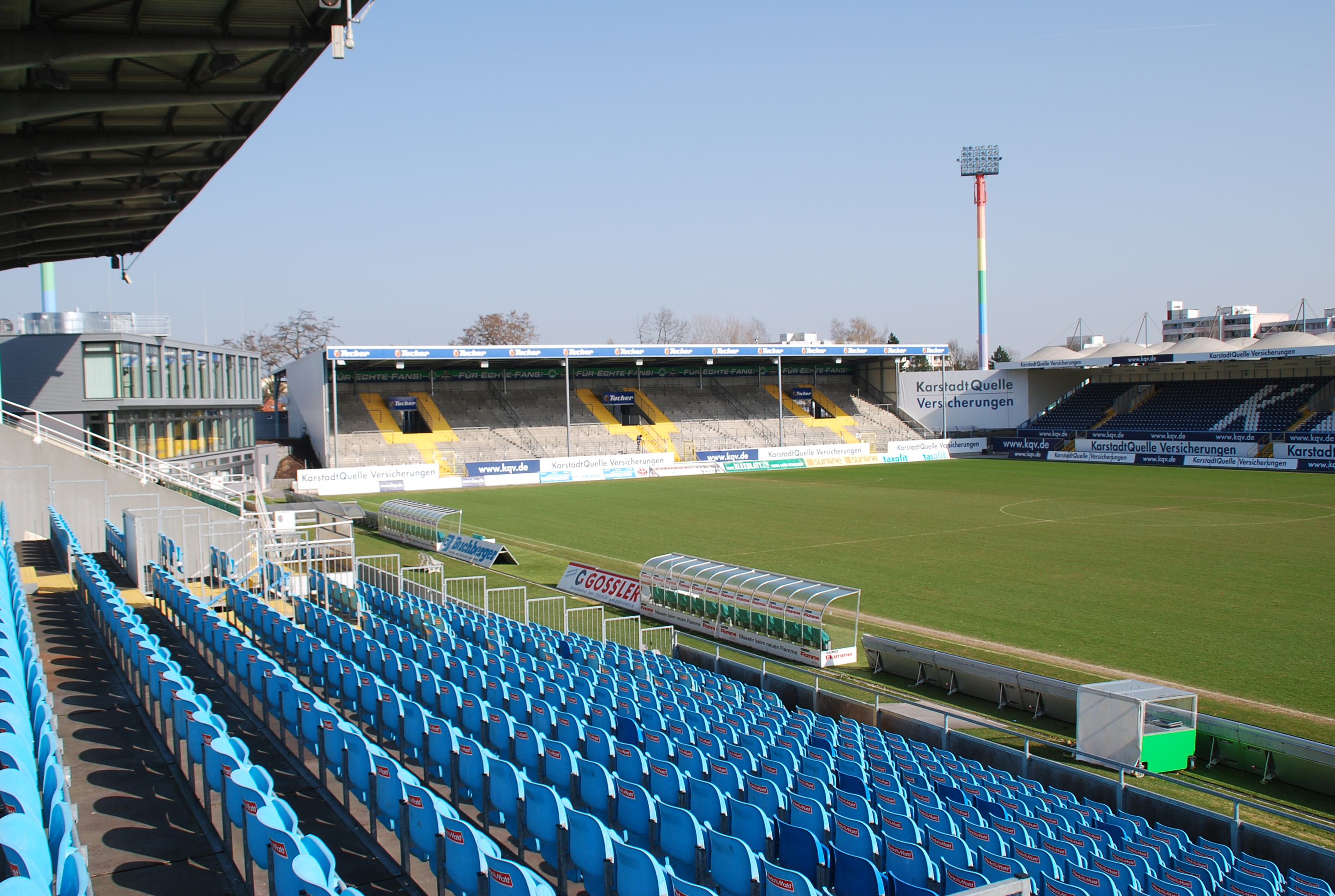 Die überdachte Nordtribüne, links VIP-Nord und die Haupttribüne, rechts ein Teil der Gegengerade